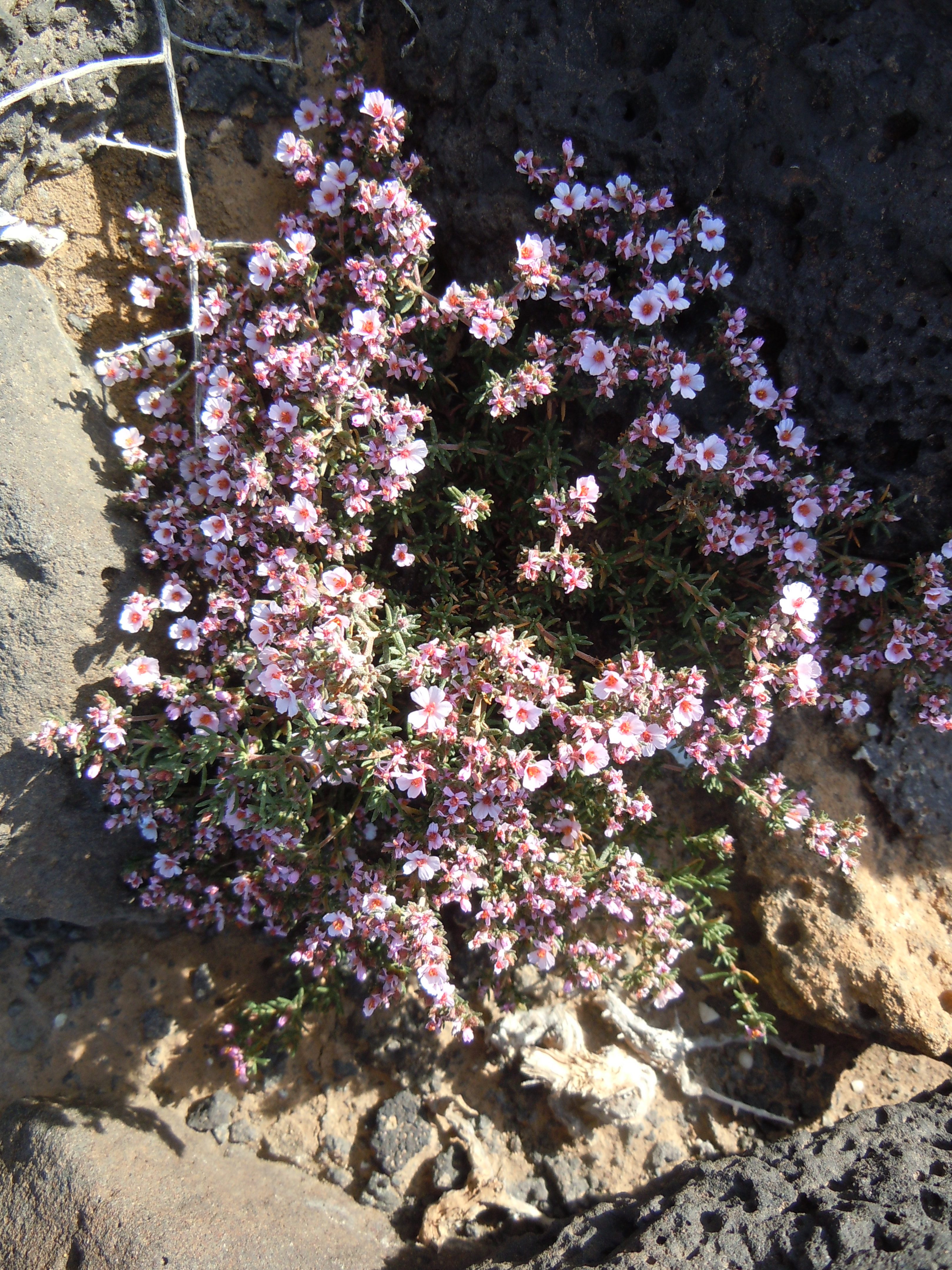 Frankenia capitata - La Carabela - Yaiza - Lanzarote